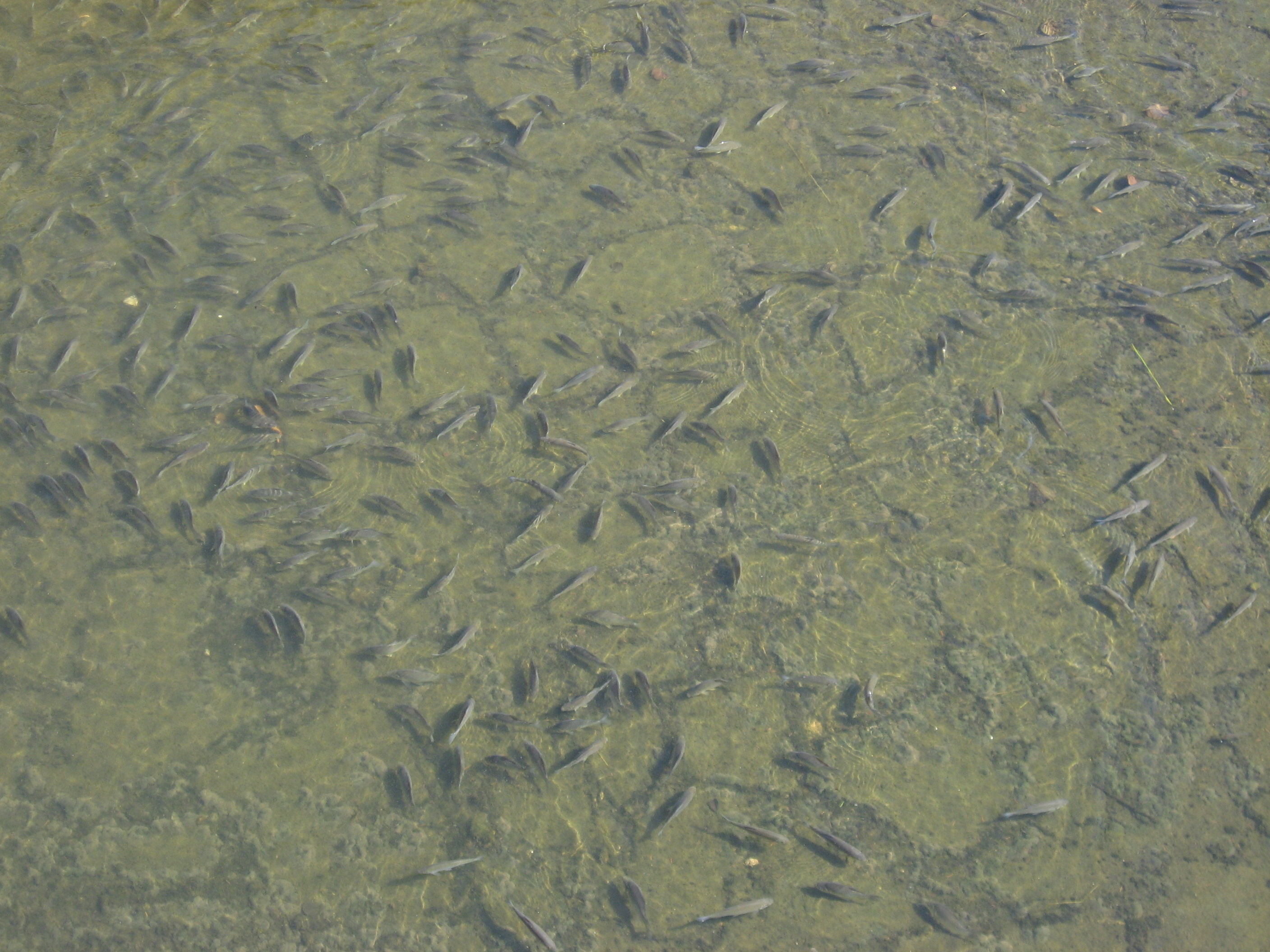 Ryby v ryblíce Peklo